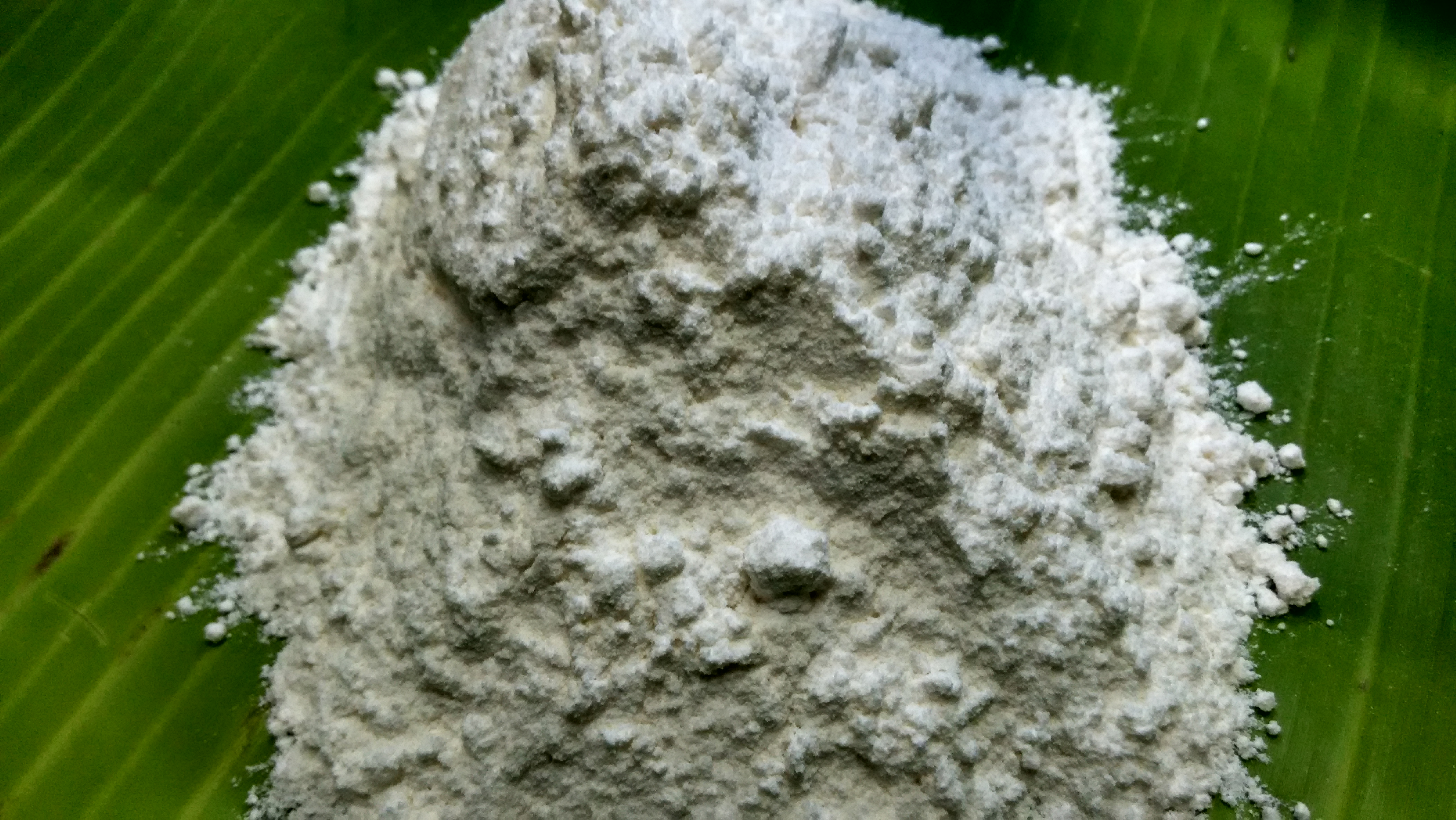 மைதா மாவு.